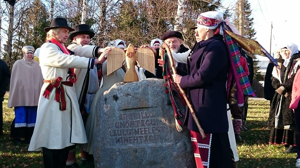 Kultuuripealinna sümbol-linnu Tsirgu jõudmine Obinitsa.